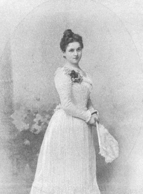 Elsa Reichlová (1879-po1913), česko-německá operní pěvkyně - sopranistka